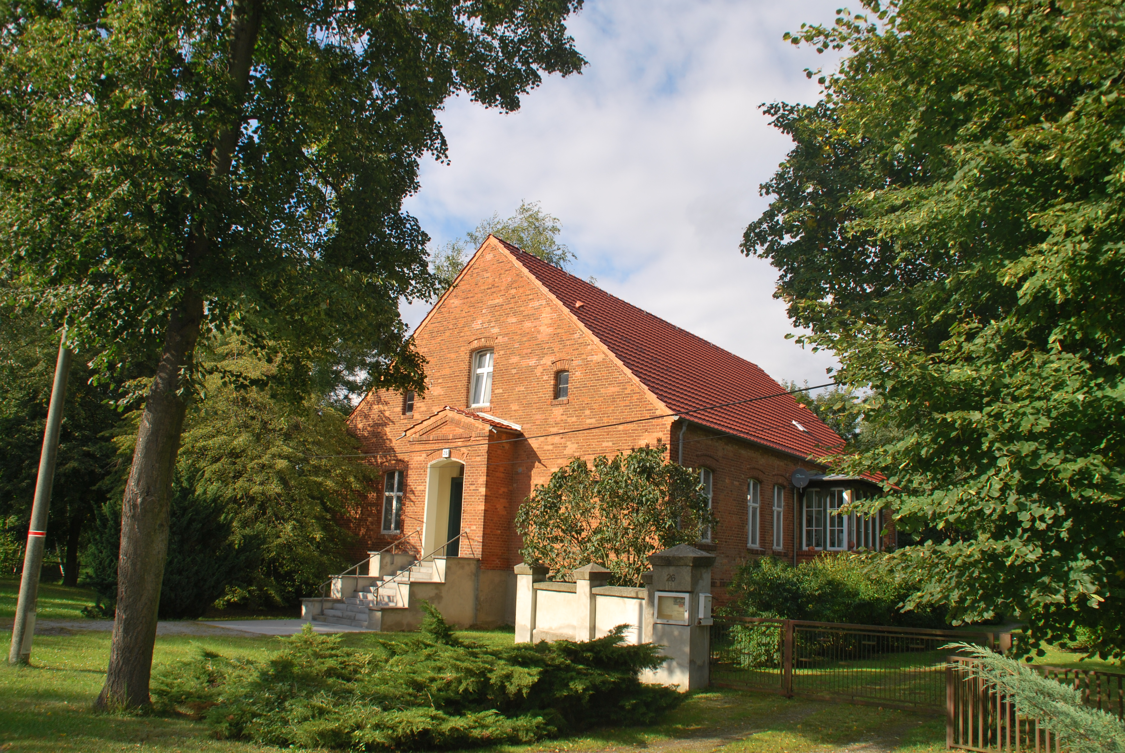 Pfarrhaus Rathstock - Halbseitenansicht von vorn